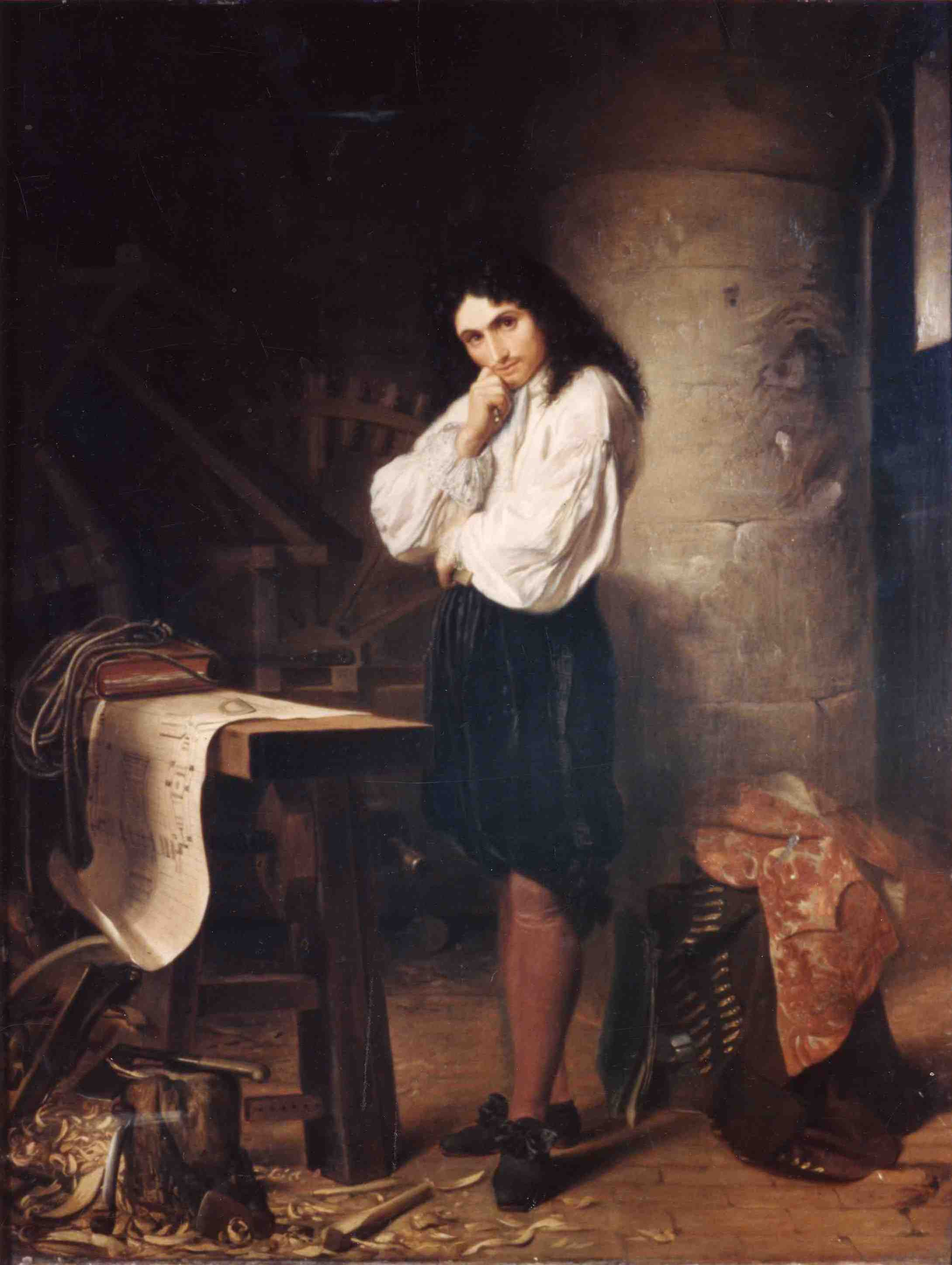 Portrait de Renkin Sualem (1645-1798) par Lebrun